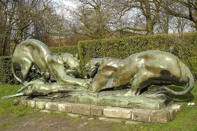 Standbeeld "Vechtende tijgers" door Jacques de Lalaing (1913) - Citadelpark - Gent